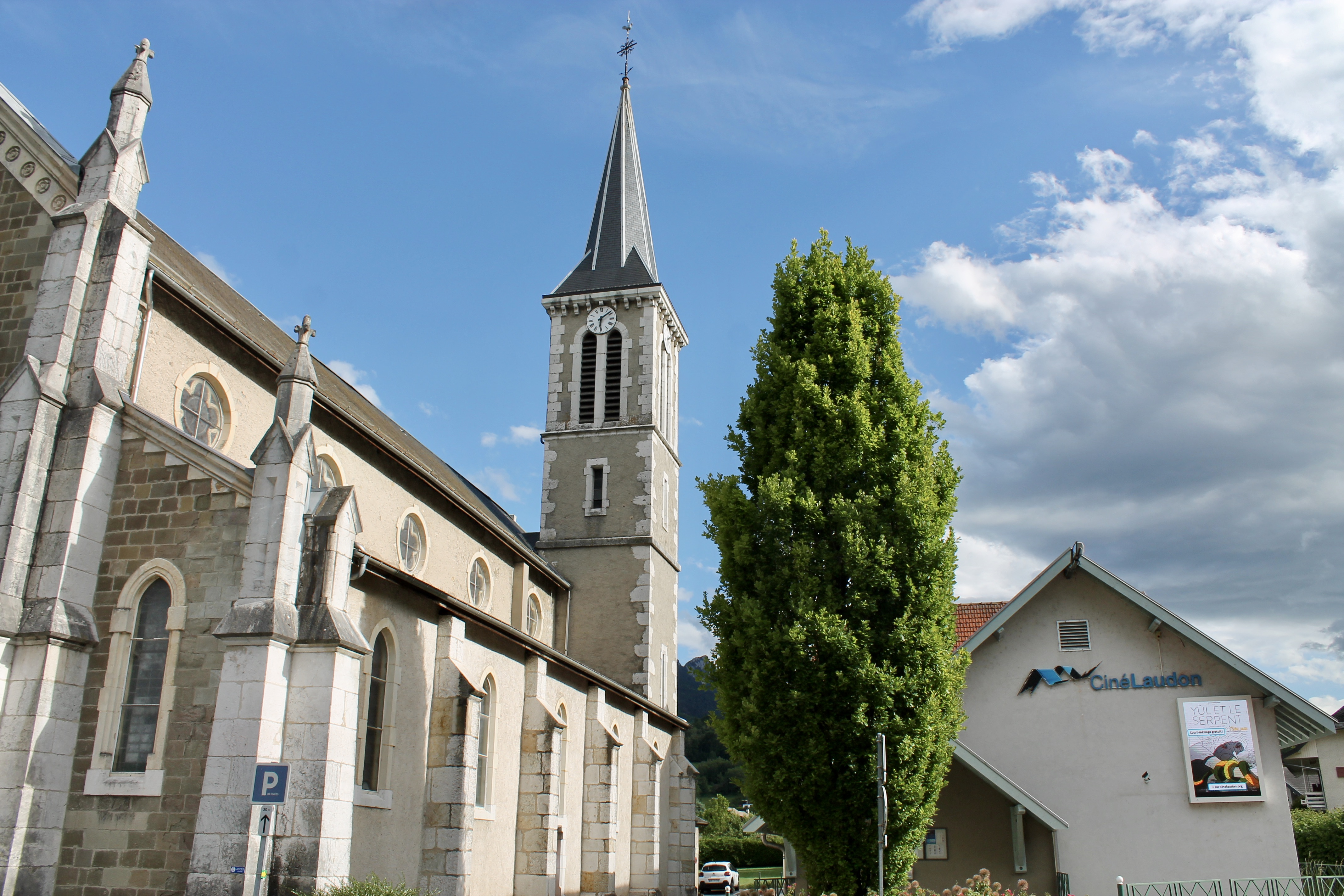 Profil de l'église Saint-Nicolas de Saint-Jorioz.